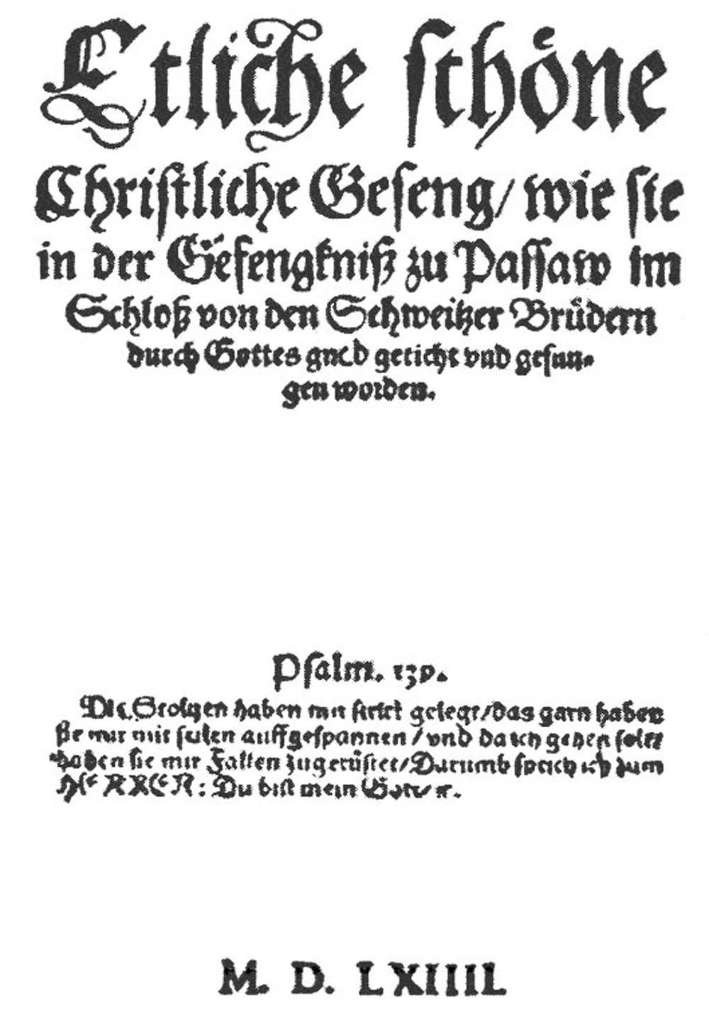 Kopie der Titelseite des täuferischen Gesangbuchs: Ausbund (16. Jahrhundert)//Archiv EFG Jever//public domain